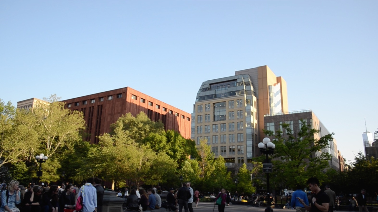 A New York Egyetem.